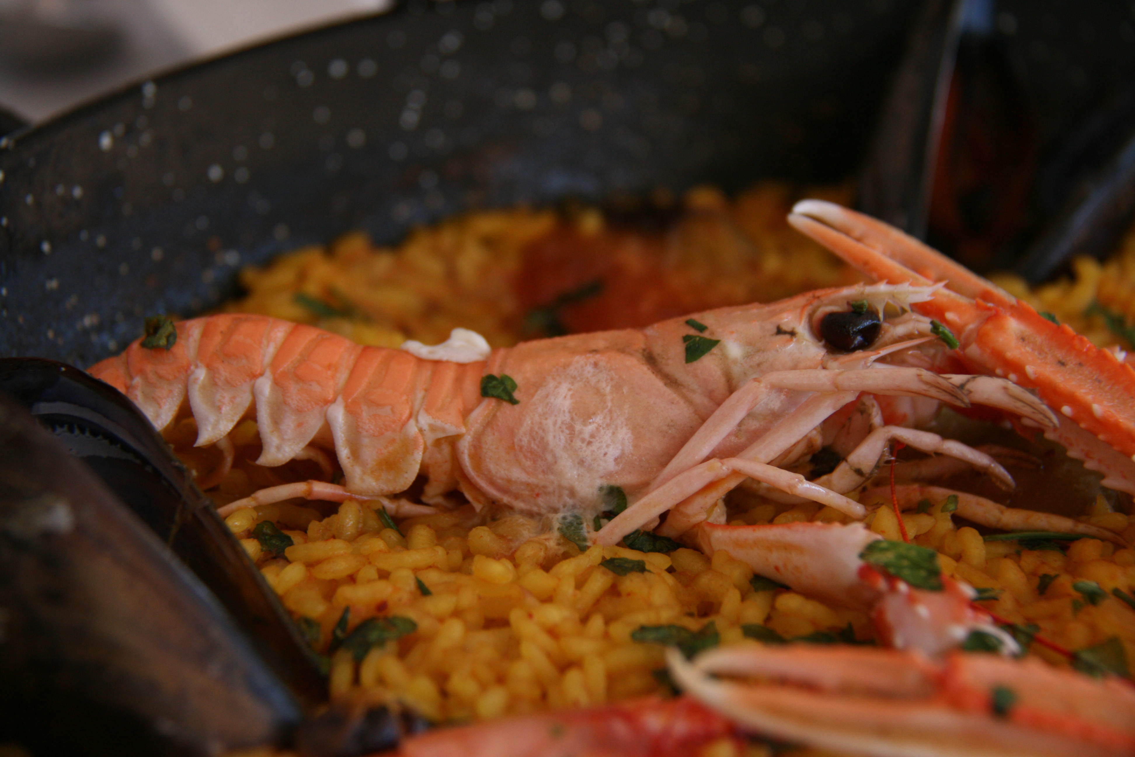 Detalle de una cigala en una paella